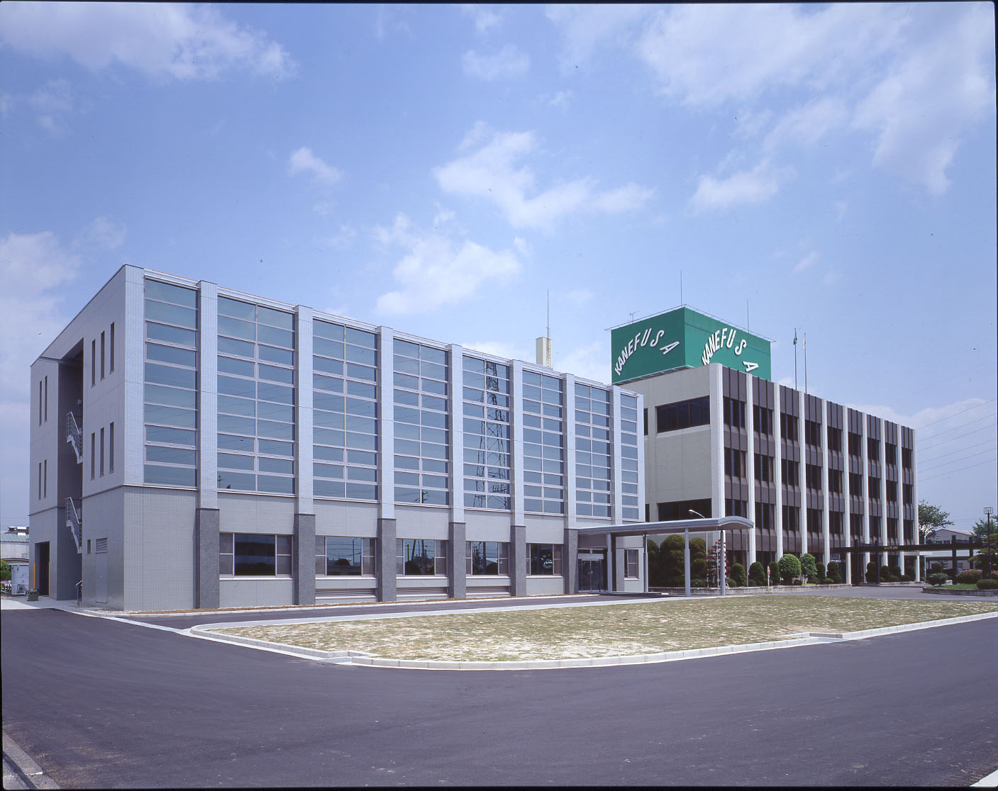 Kanefusa head office